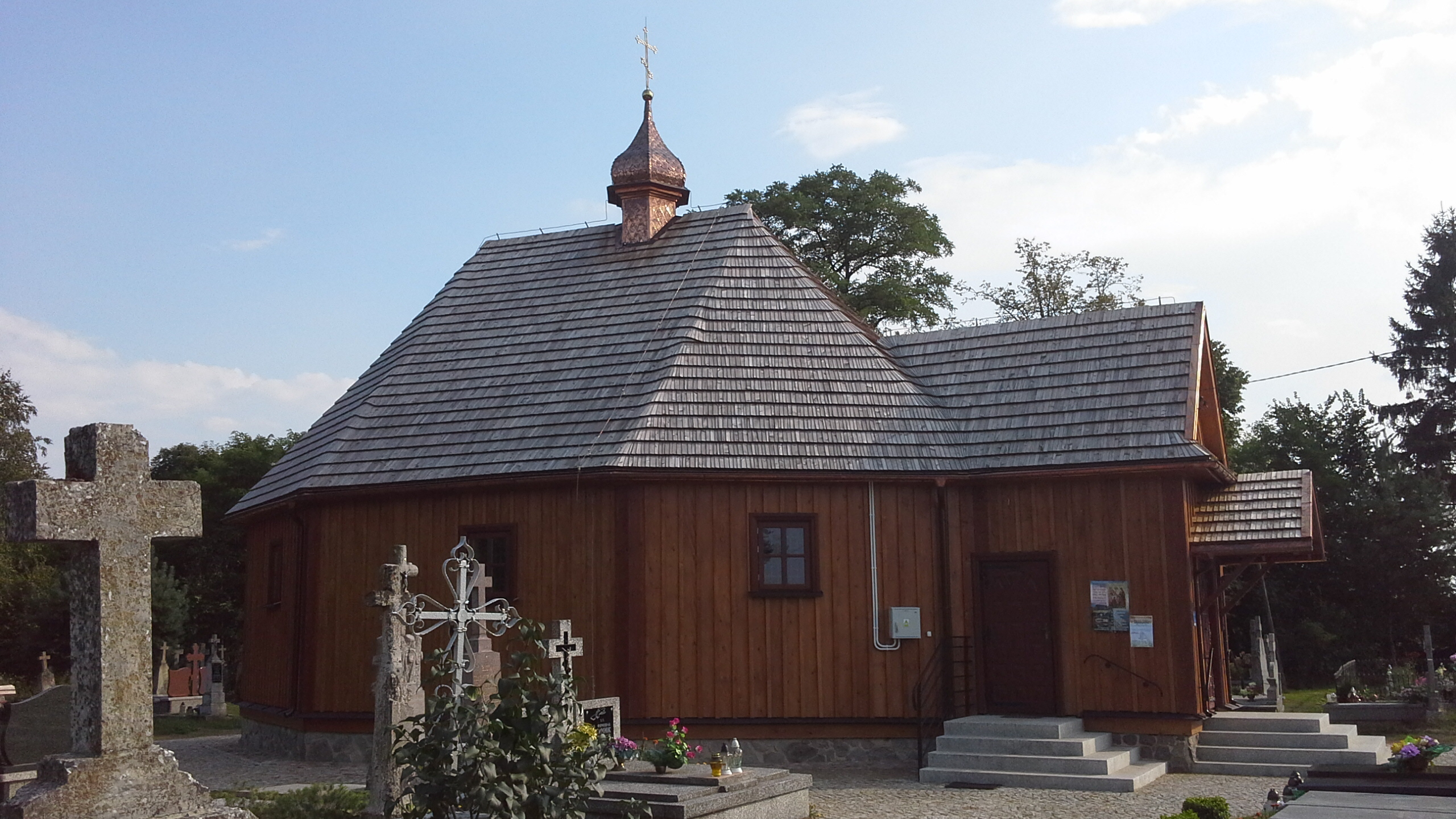 Cerkiew cmentarna w Czarnej Wielkiej widziana z głównej alei cmentarza